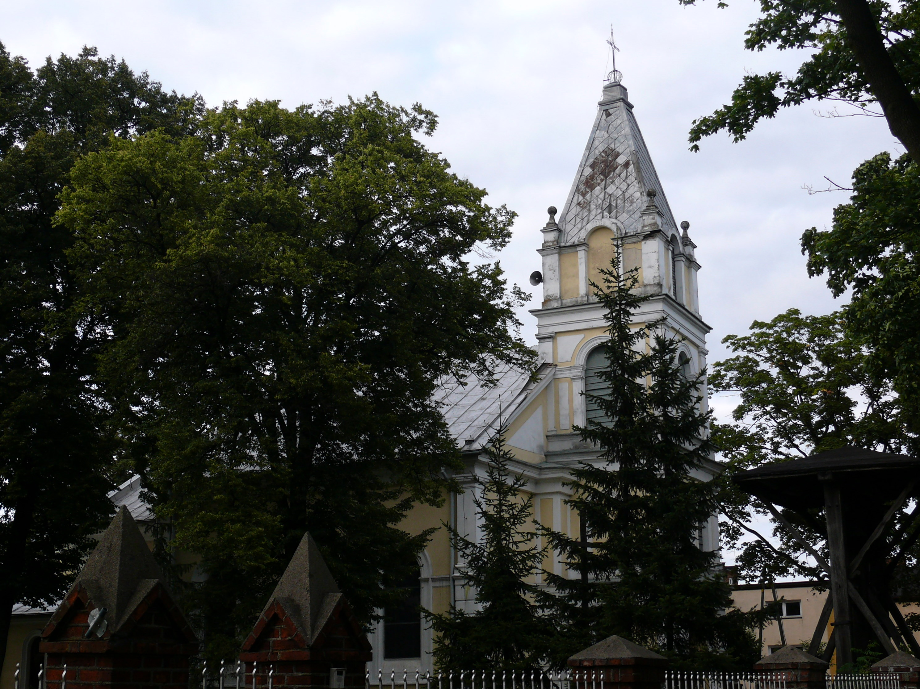 Babiak - kościół Przemienienia Pańskiego, 1904-1907